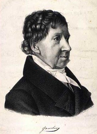 Anders Gamborg (24.11.1753-11.9.1833) dansk professor og Regensprovst